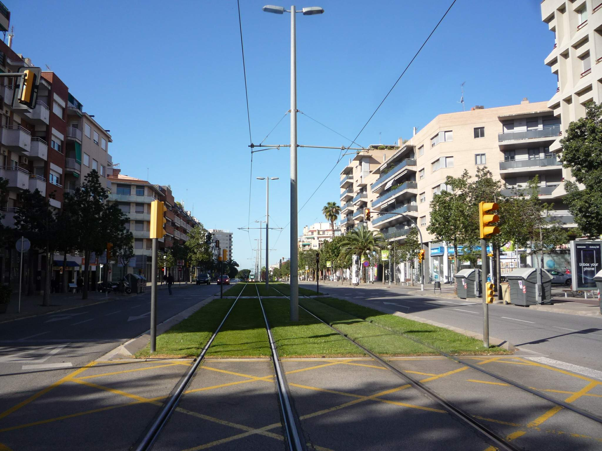 Esplugues de Llobregat (Barcelona)